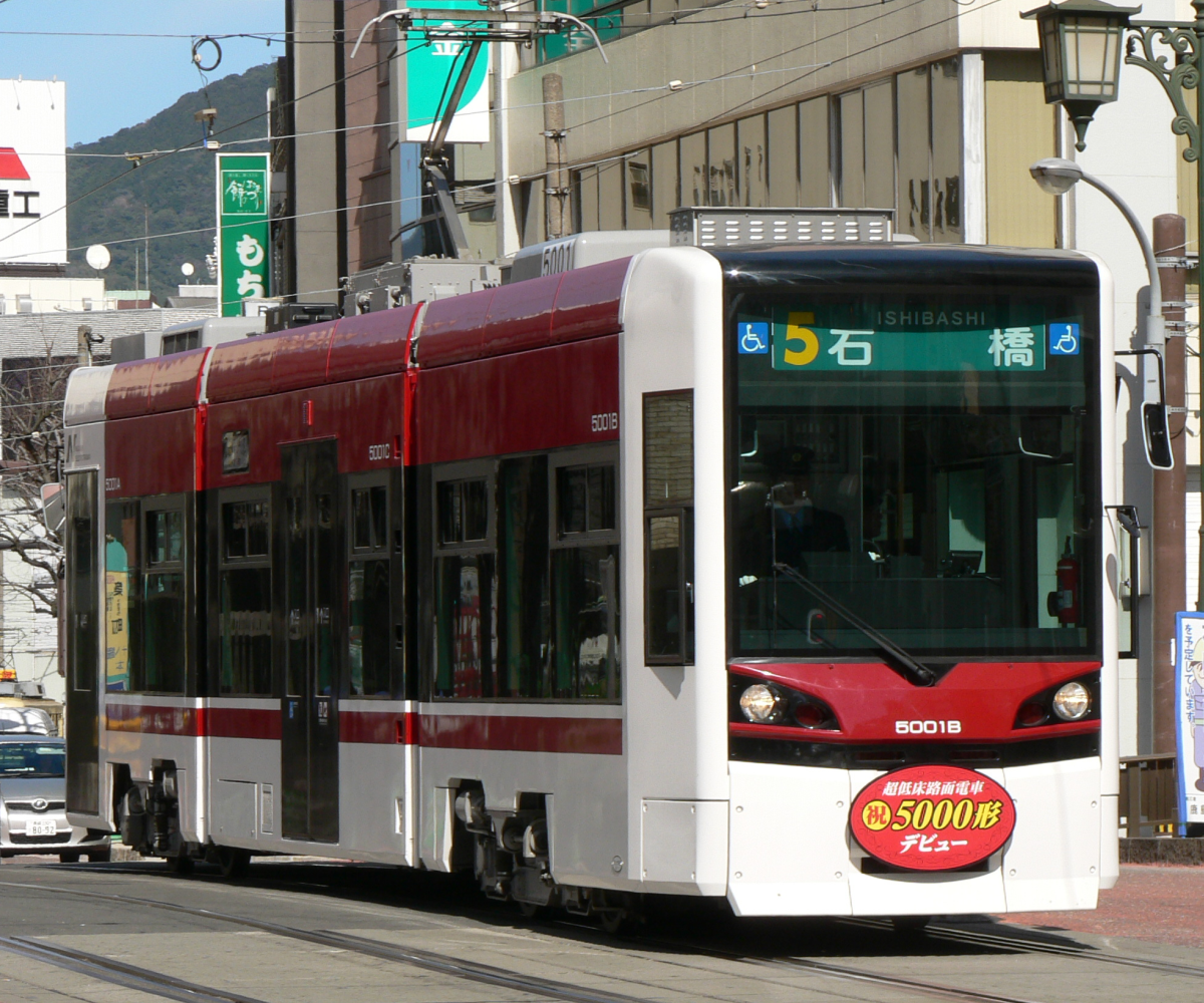 長崎電気軌道5001号、運行開始のヘッドマーク付き。築町電停付近にて撮影。